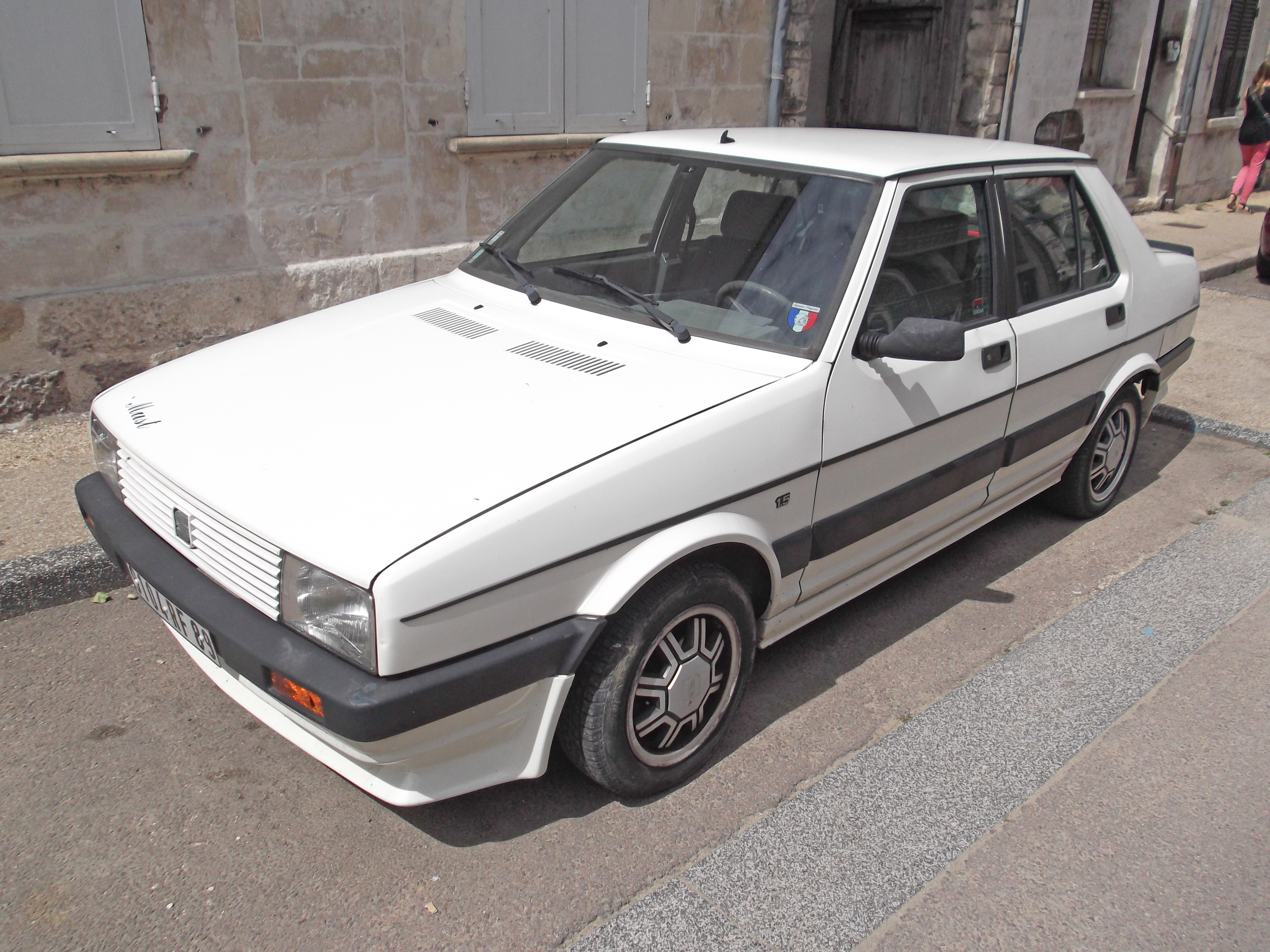 SEAT Malaga GLX